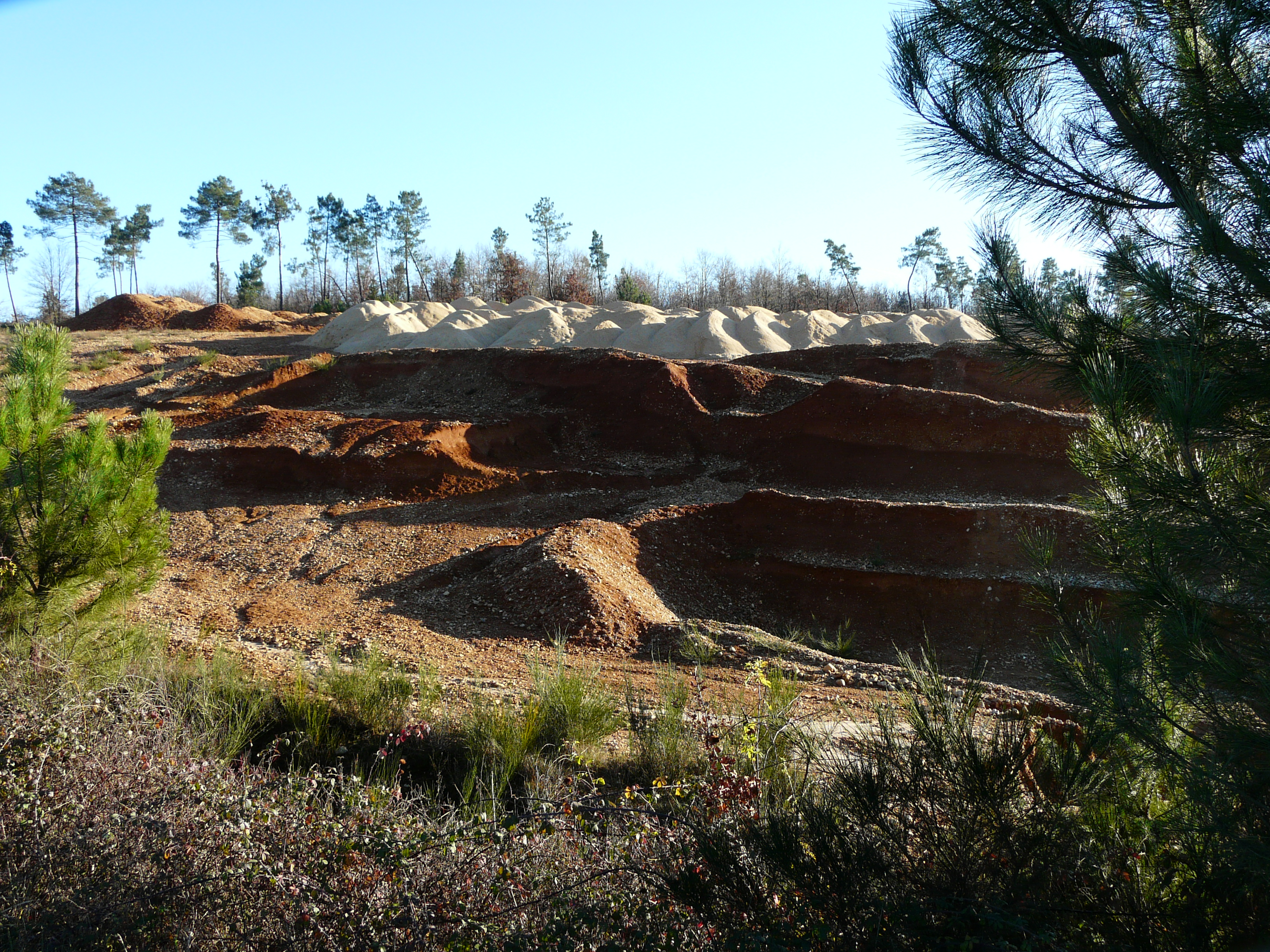 Carrière d'exploitation de quartz, Saint-Jean-de-Côle, Dordogne, France